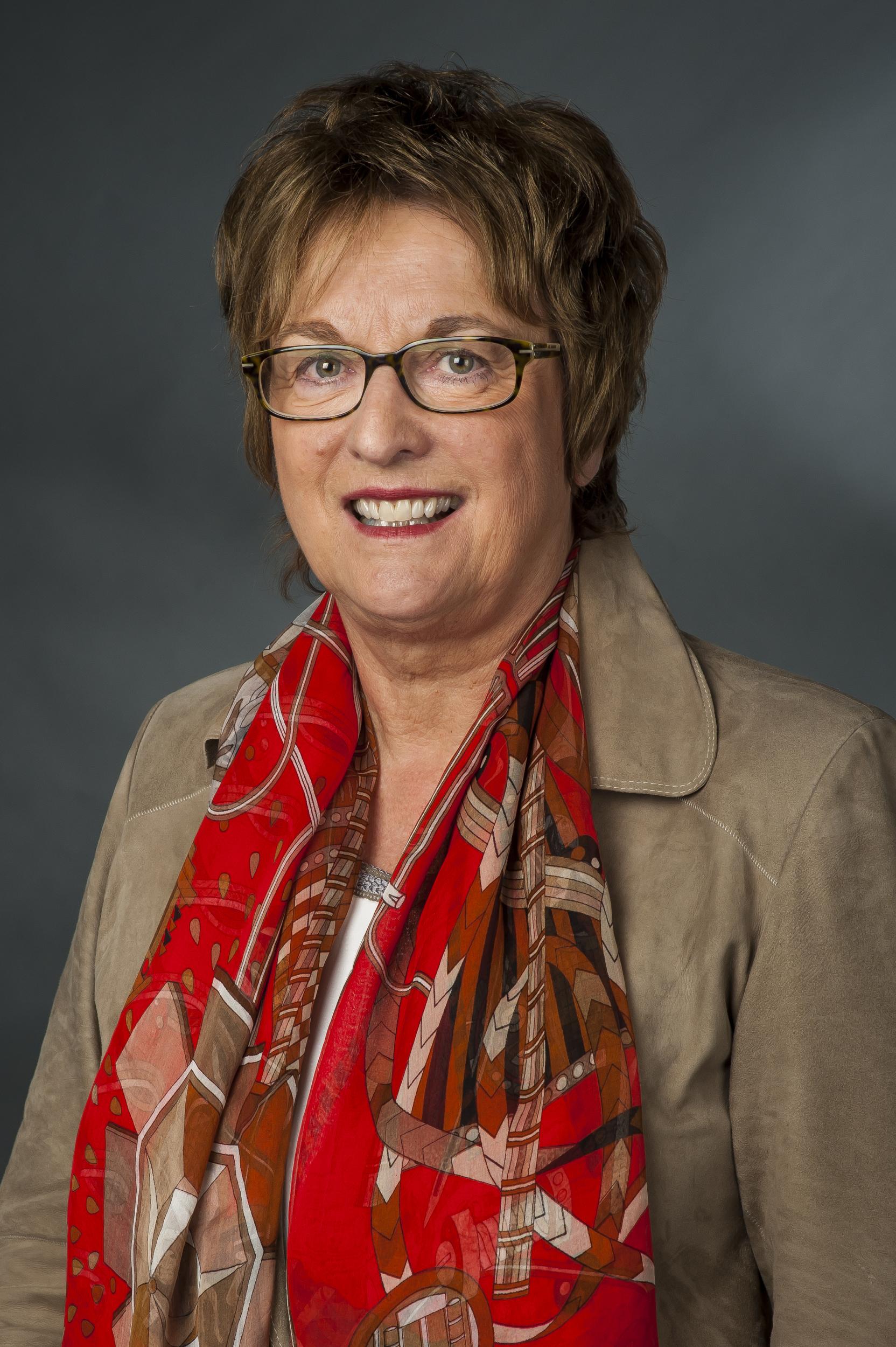 Brigitte Zypries (* 16. November 1953 in Kassel) ist eine deutsche Politikerin (SPD), sie war von 2002 bis 2009 Bundesministerin der Justiz in den Kabinetten Schröder II und Merkel I und ist seit dem 17. Dezember 2013 Parlamentarische Staatssekretärin beim Bundesminister für Wirtschaft und Energie. Sie ist in diesem Rahmen zuständig für IT sowie für Luft- und Raumfahrt.